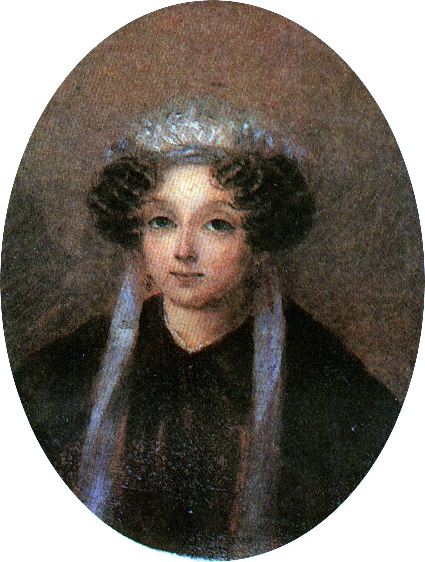 Мария Ивановна Гоголь (Косяровская)